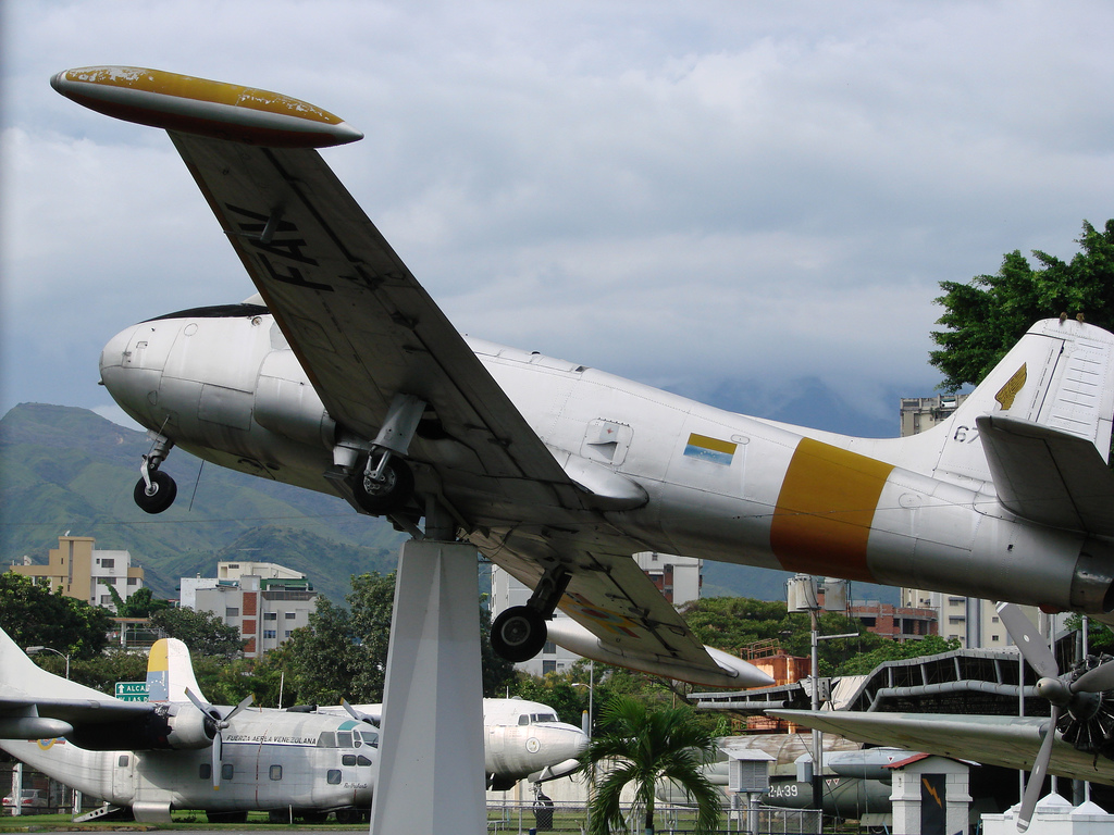 Maracay. Estado Aragua. Venezuela.